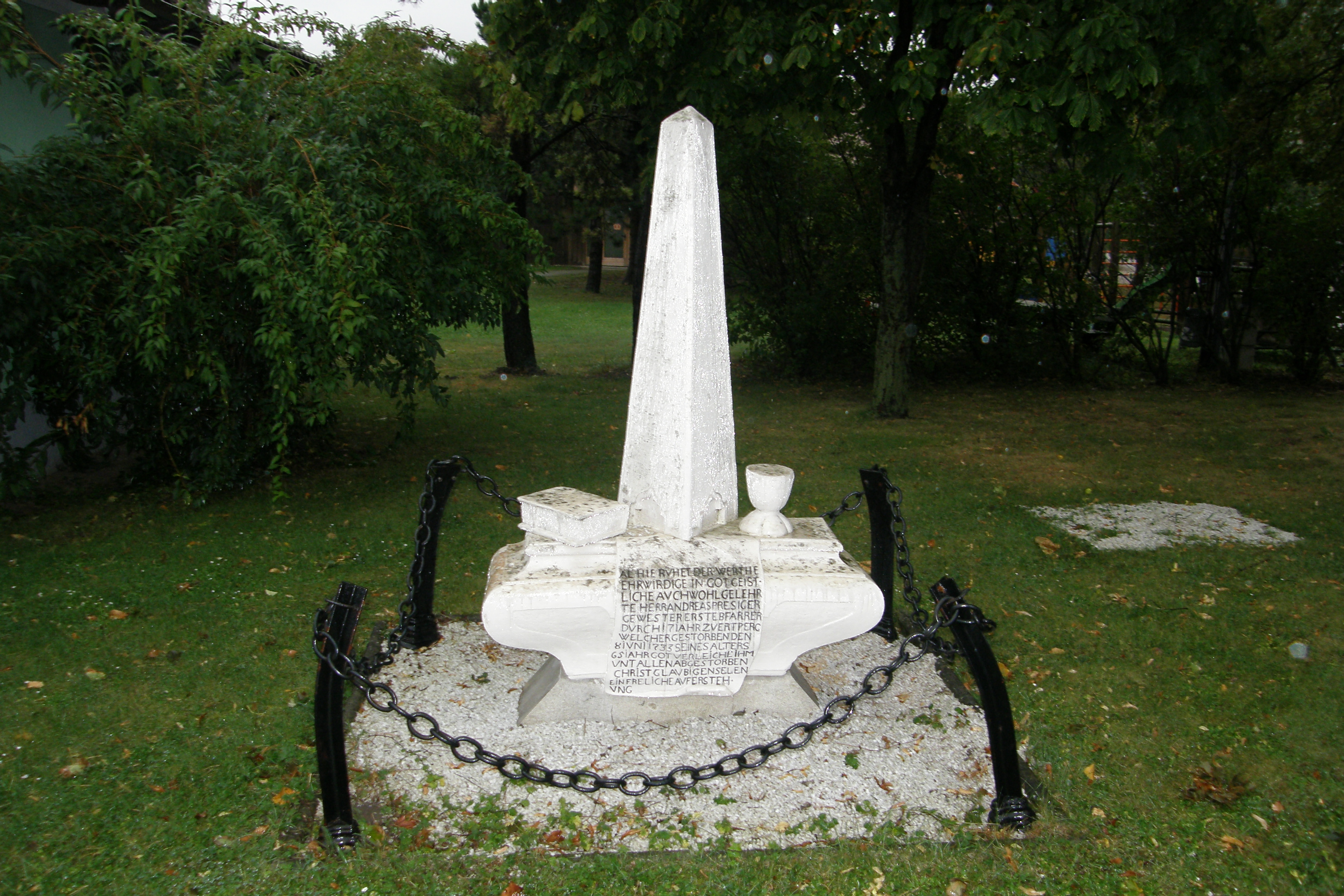 Grabdenkmal/Epitaph